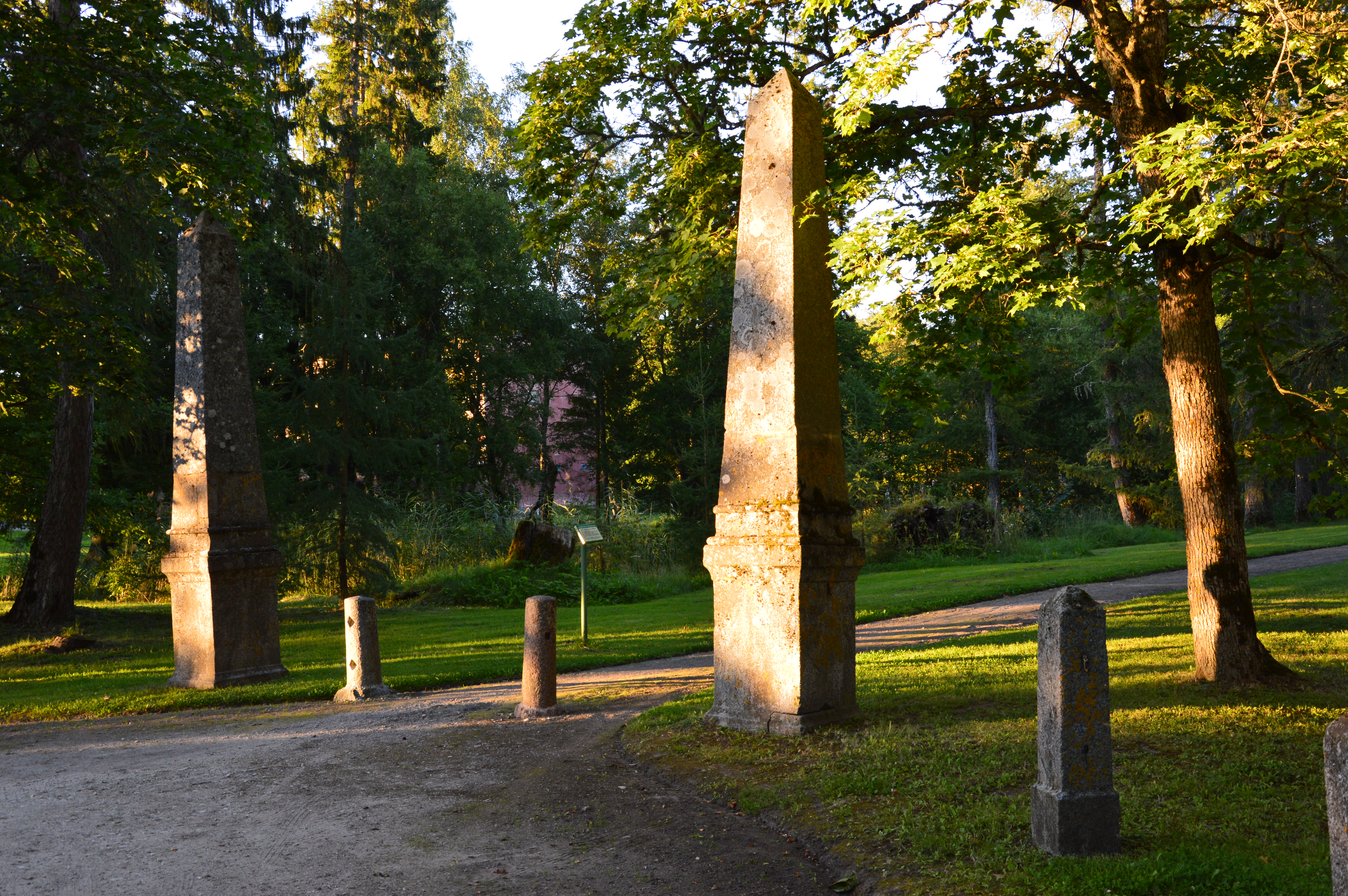 Vana-Vigala mõisa väravapostid